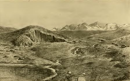 Massif montagneux, et fjord à Vathnaverfi, zone entourant les ruines d'Undir Hofda.